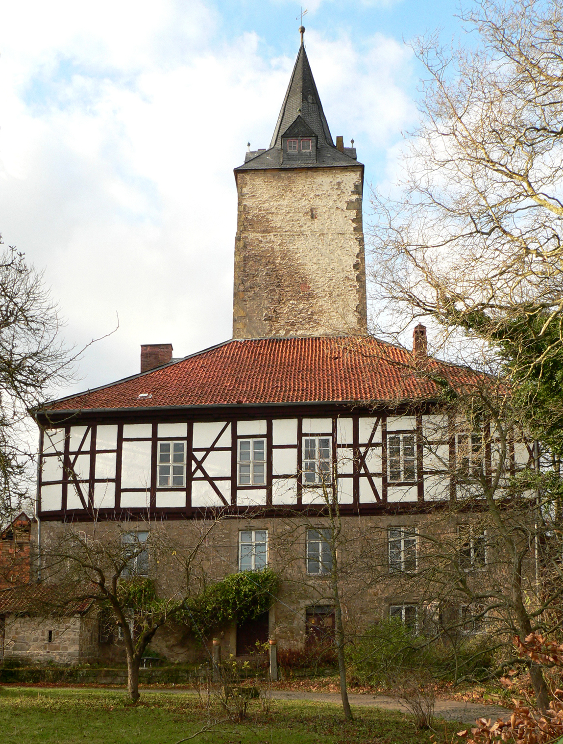 Burg Lutter, Bergfried und Hauptgebäude von der Fachwerkseite